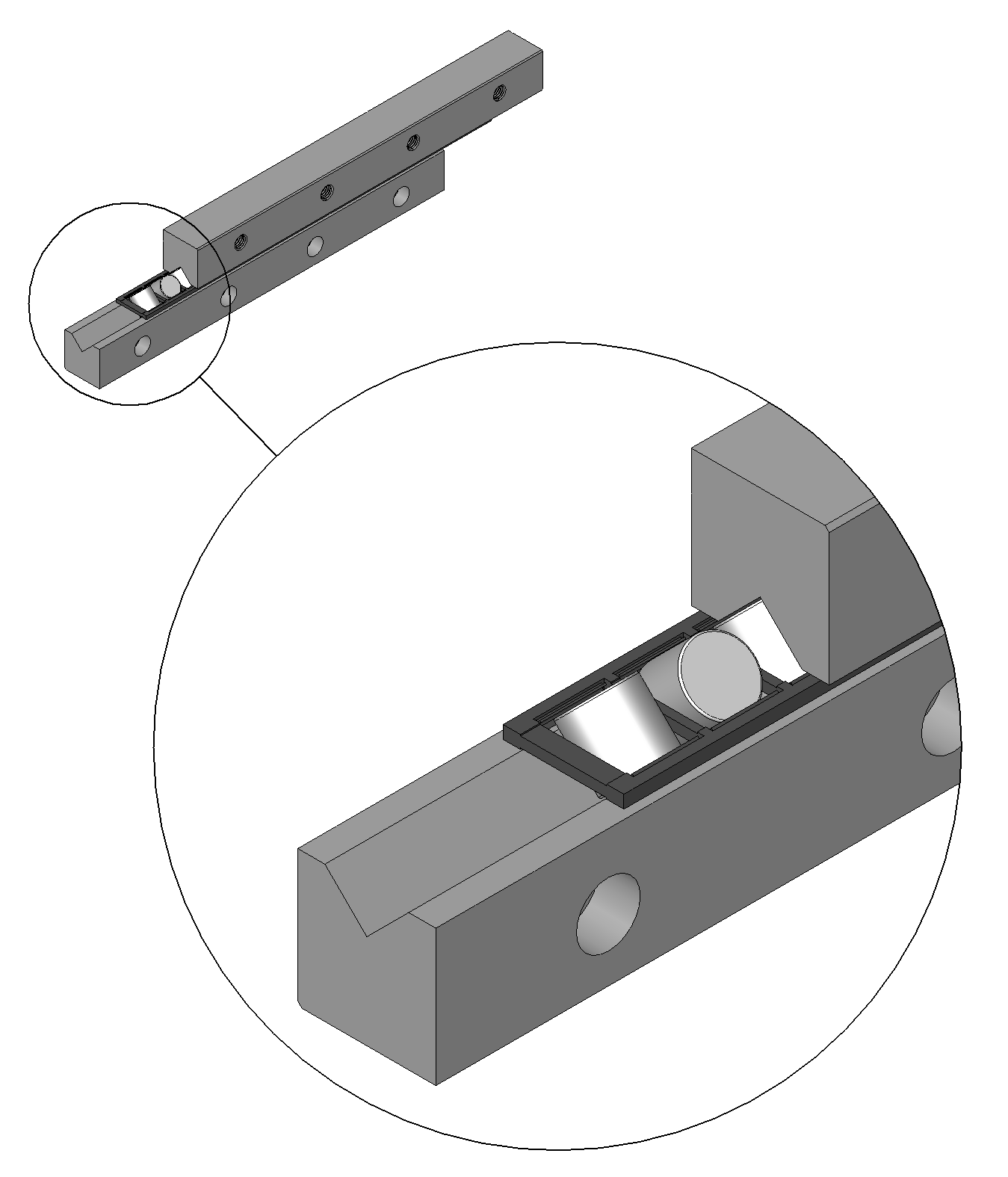 Darstellung einer Linearführung nach DIN 644 mit vergrössertem Detail. Die DIN 644 legt die Einbau- und Anschlussmaße für die Führungen fest. Der innere Aufbau bleibt dem Hersteller überlassen. Die hier gezeigte Führung besitzt jeweils um 90° versetzt angeordnete Zylinderrollen als Wälzkörper (Kreuzrollenanordnung).